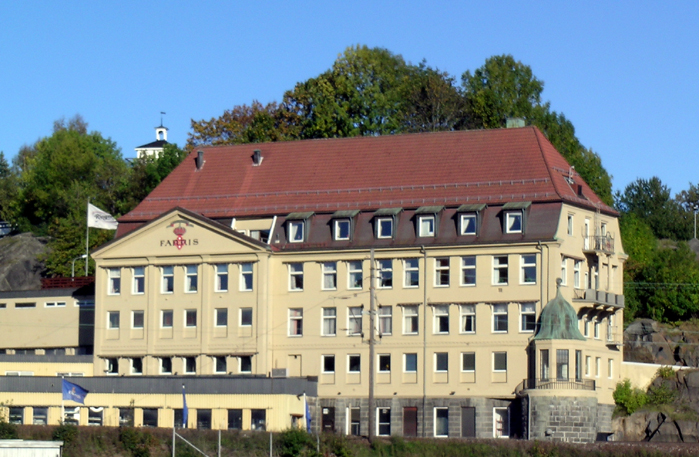 Farrisfabrikken, Larvik, Norway. Built 18912-1914. Architects: Christian Morgenstierne and Arne Eide.